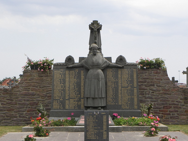 Monument aux morts de Bédée (35). .